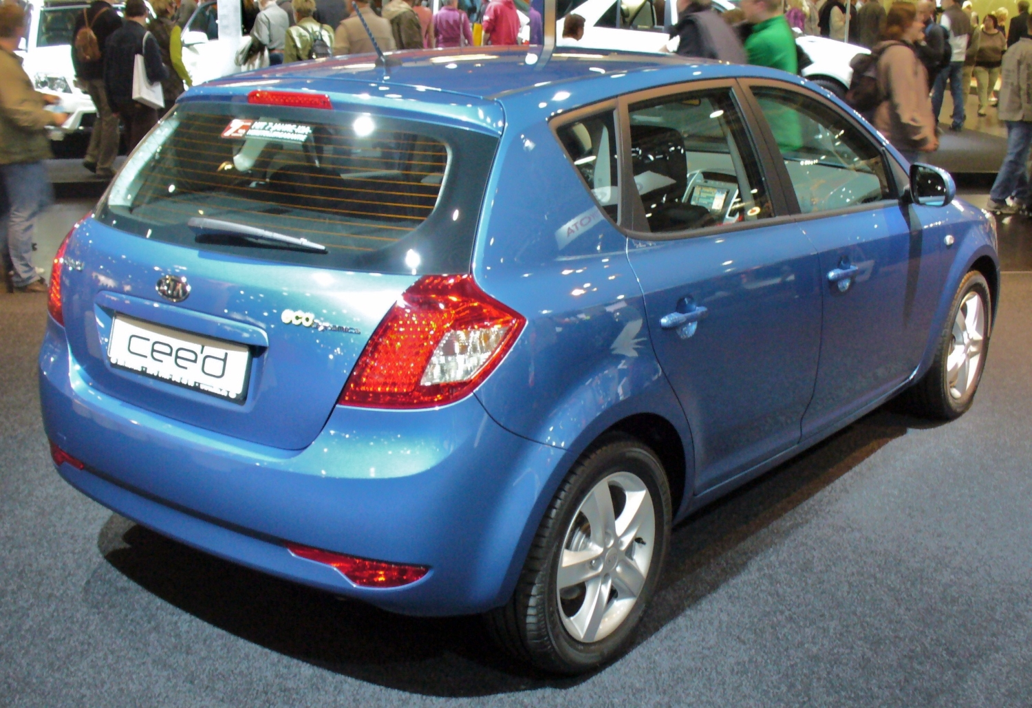 Kia cee'd Facelift